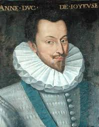 duc de joyeuse